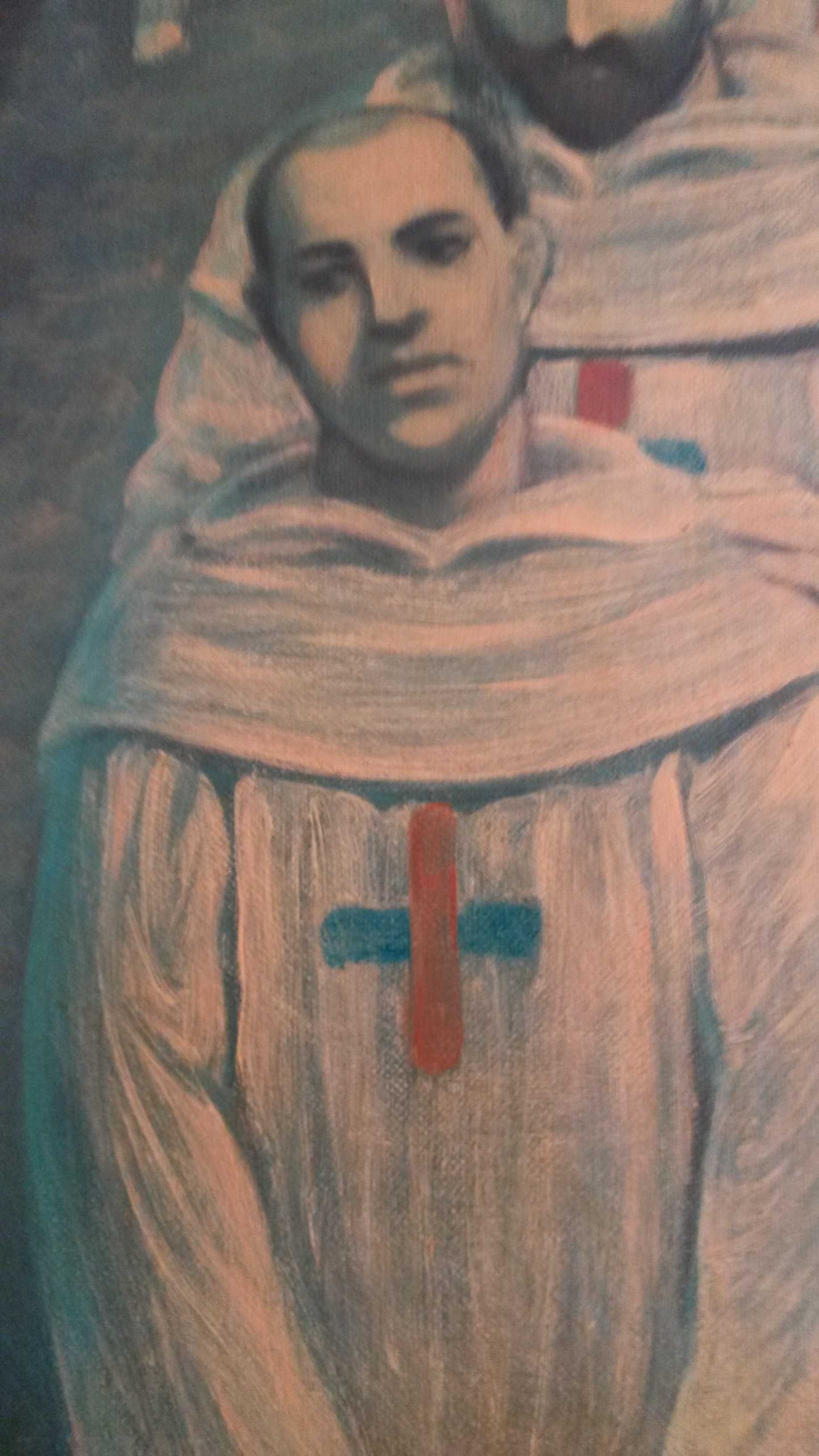 Particular del cuadro de San Hermenegildo de la Asunción y compañeros mártires que se venera en la iglesia de San Carlino alle quattro Fontane de Roma.